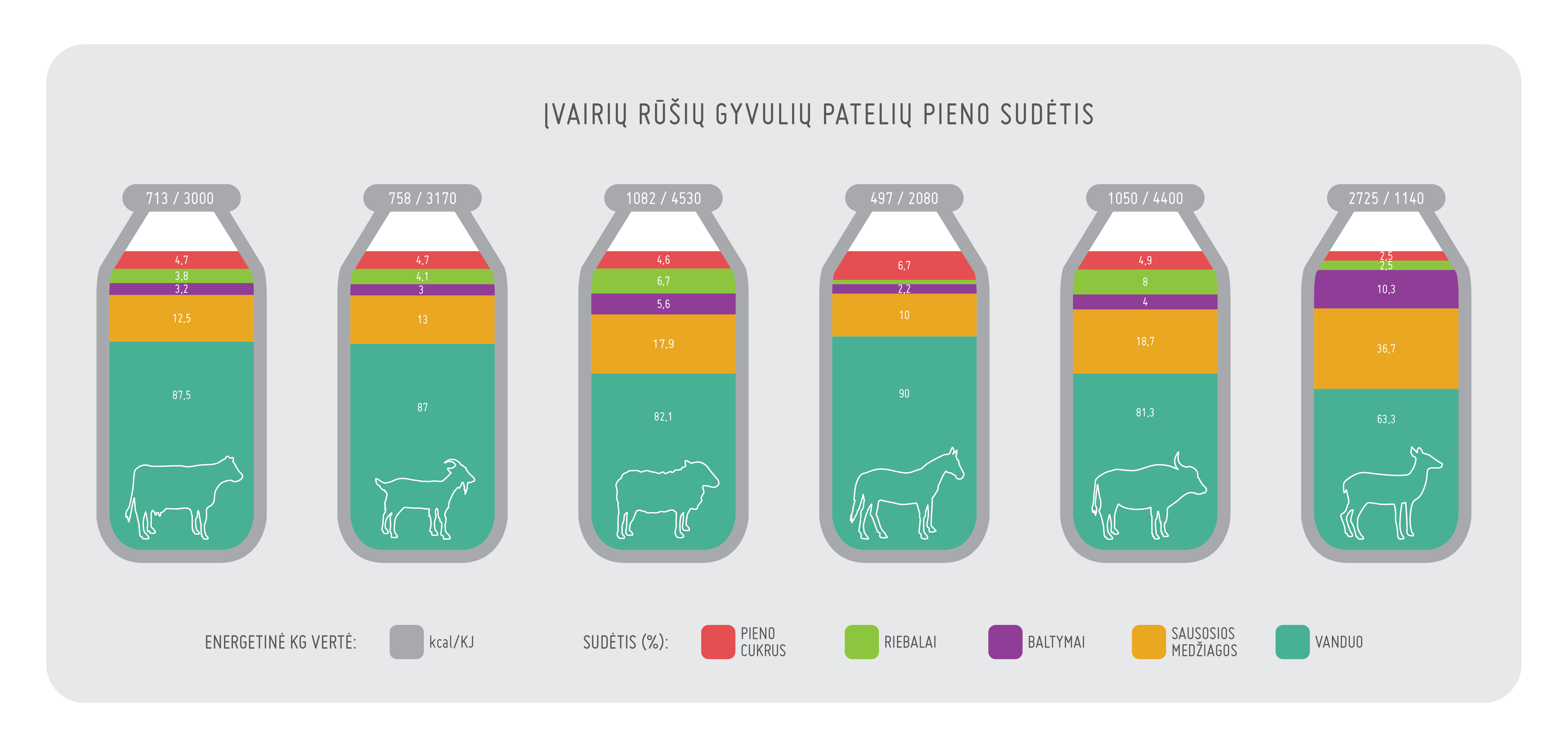 Įvairių rūšių patelių pieno sudėtis